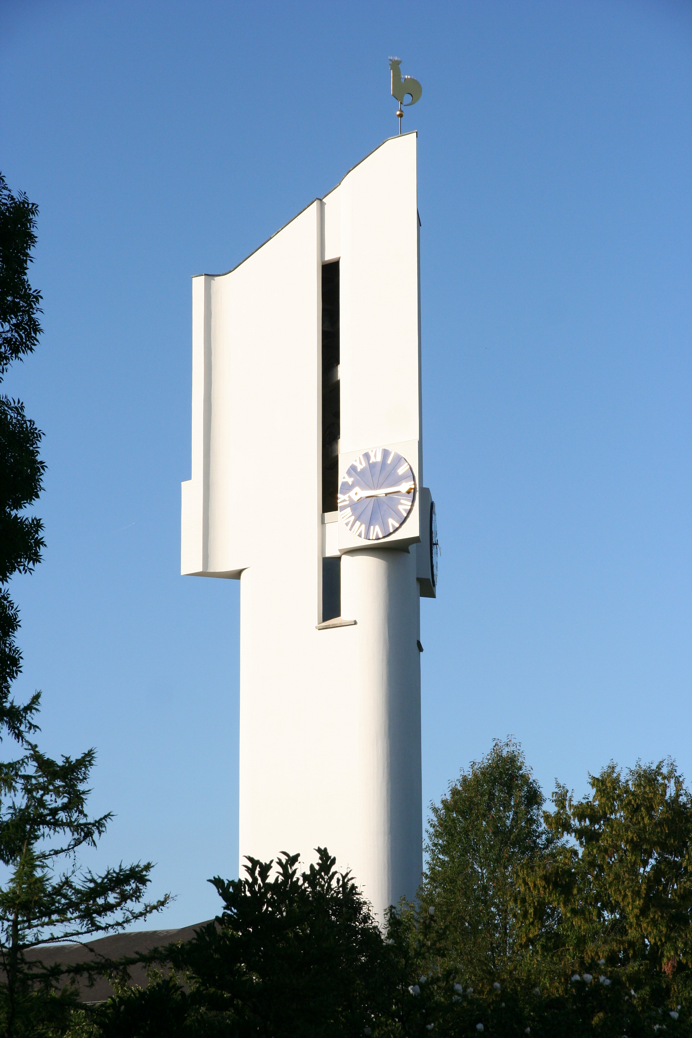 Evangelische Kirche Bischofszell